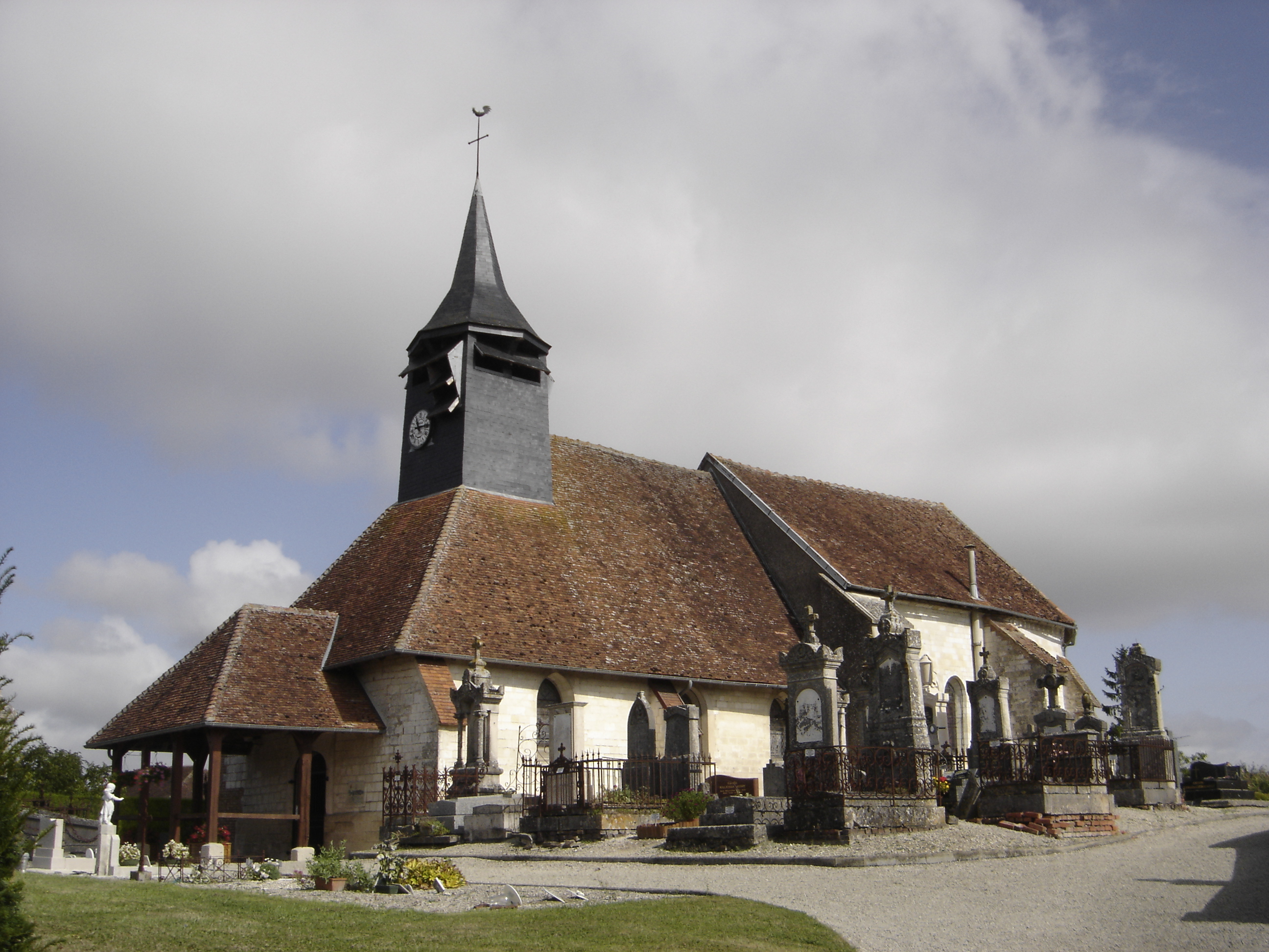 église Saint-Martin de Rouilly (commune de Rouilly-Sacey) - Aube - France